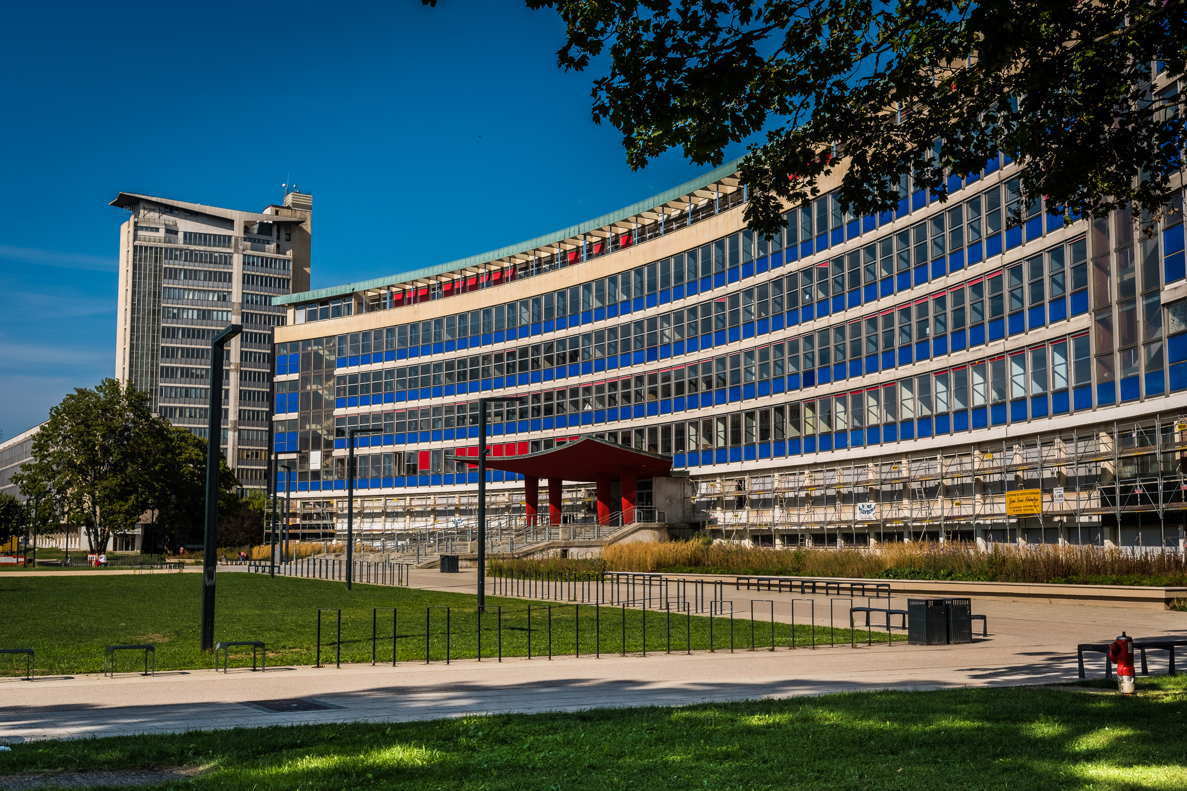 Unistra la tour de chimie et la faculté de droit Strasbourg août 2019